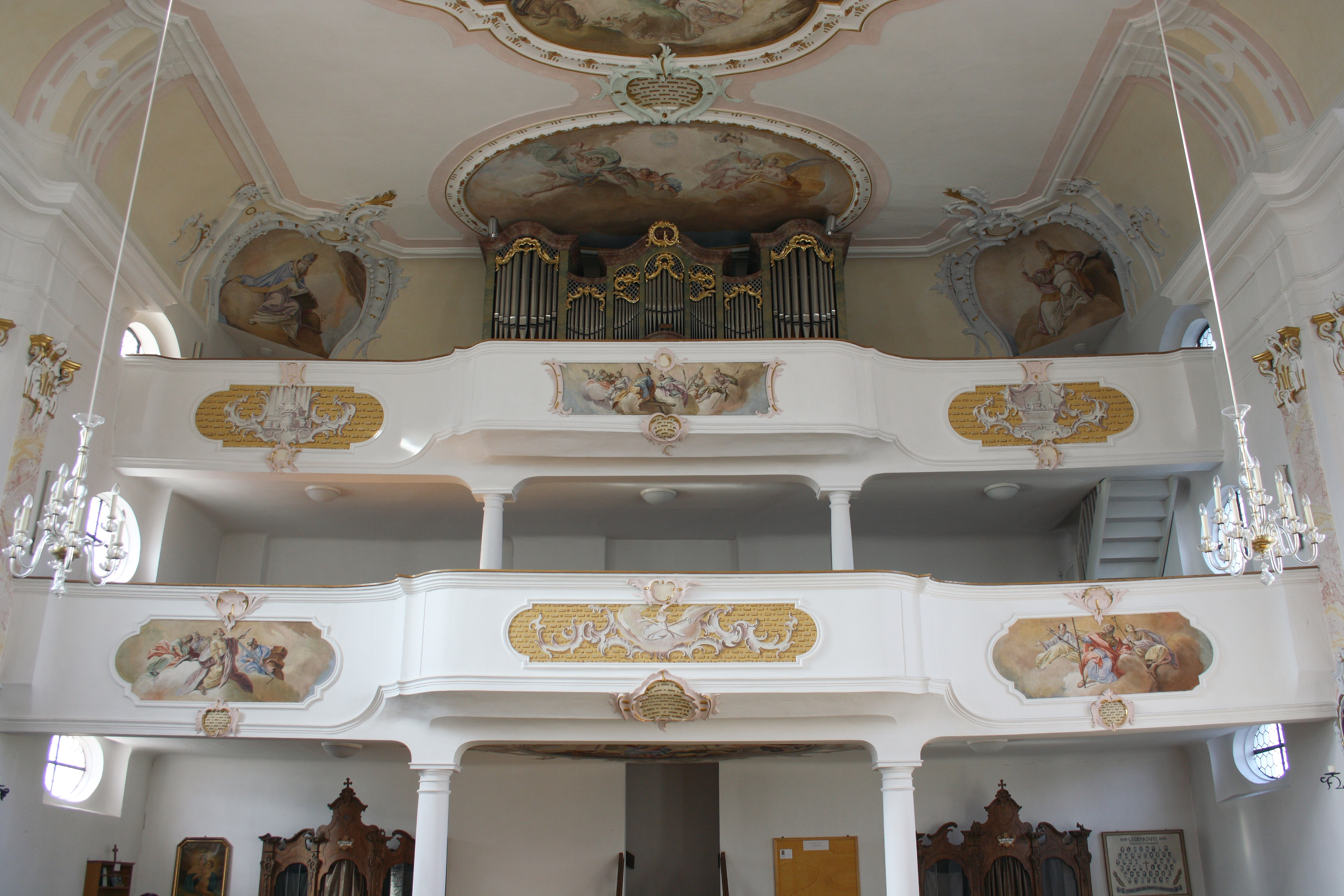 Katholische Pfarrkirche Mariä Himmelfahrt in Scheppach, einem Ortsteil von Jettingen-Scheppach im Landkreis Günzburg (Bayern), Stuck von 1769/70; Doppelempore, Fresken an der Emporenbrüstung von Franz Martin Kuen, Darstellung: Apostel